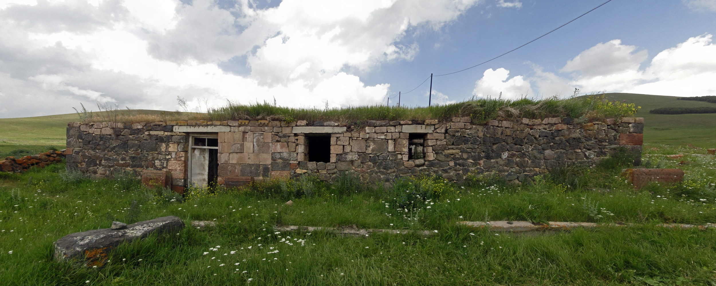 Церковь в Лернапаре